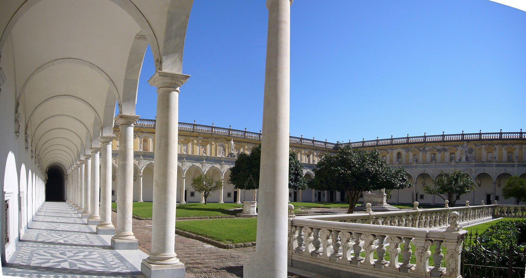 Napoli, Certosa di san Martino: Chiostro grande